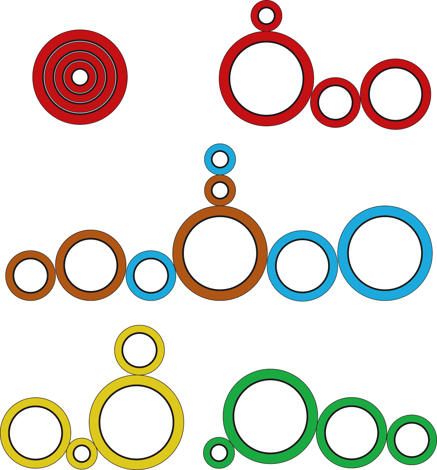 varie ipotesi di composizione della "Tube Chair" di Joe colombo per Flexform (Italia 1969)